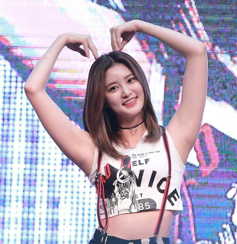 160714 조윤희의 볼륨을 높여요 - EXID 직찍